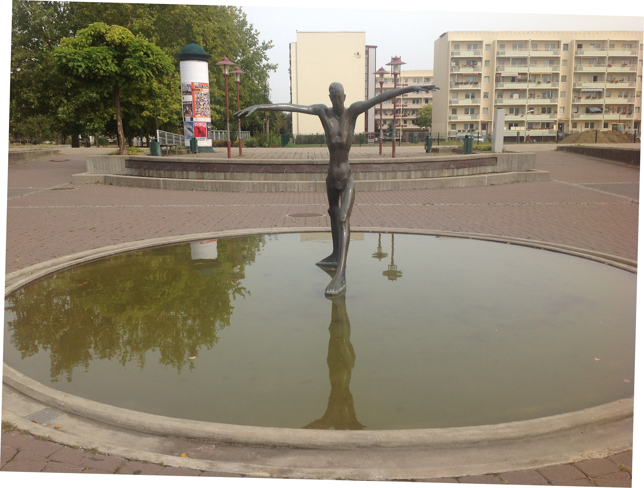 Der "Schreitende" wurde von Klaus Messerschmidt in einem Wettbewerb für den Marktplatz von Neu Olvenstedt entworfen.